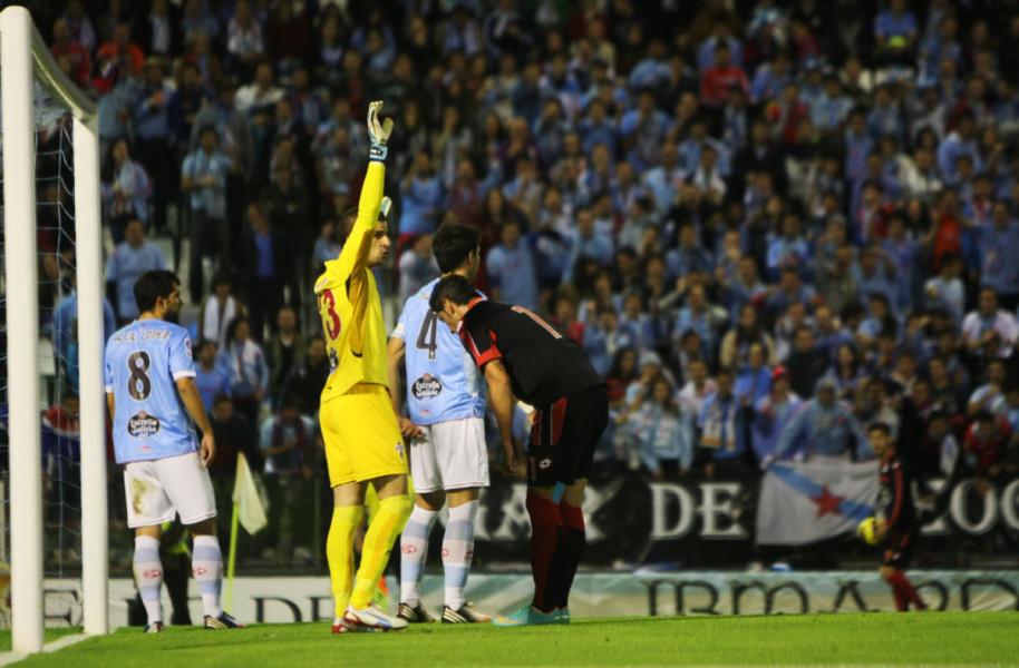 Xogada no partido Celta-Dépor do 27 de outubro do 2012.